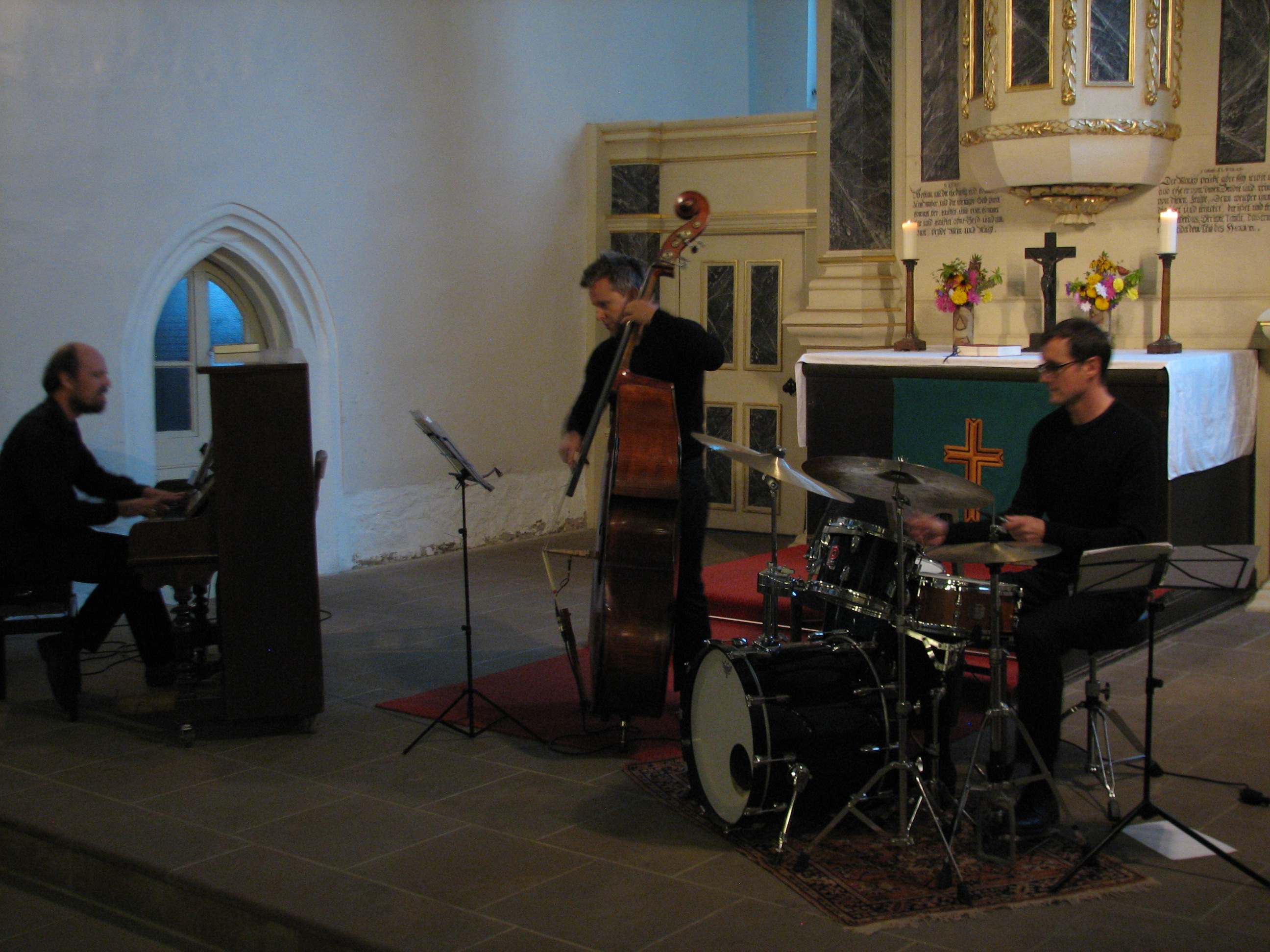 Von Klassik über Orgel bis Jazz: In der Stadtkirche Naunhof erklingt ein vielseitiges Musikspektrum. Hier Jazz mit dem Trio Bending Times Anfang September 2017.